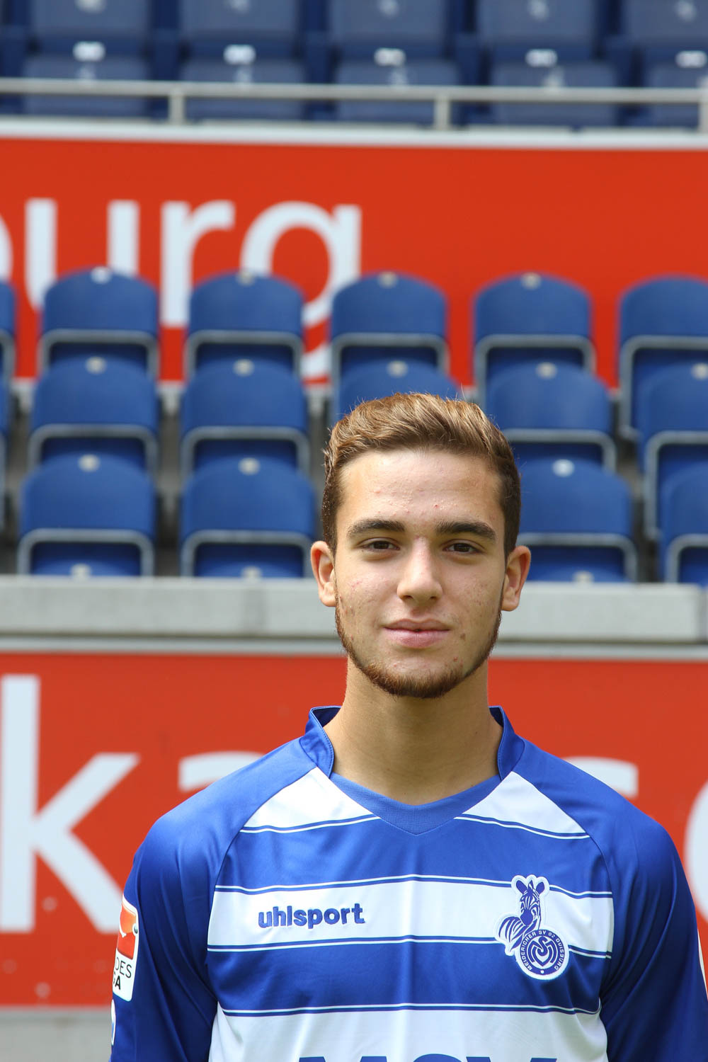 Ahmet Engin 2015